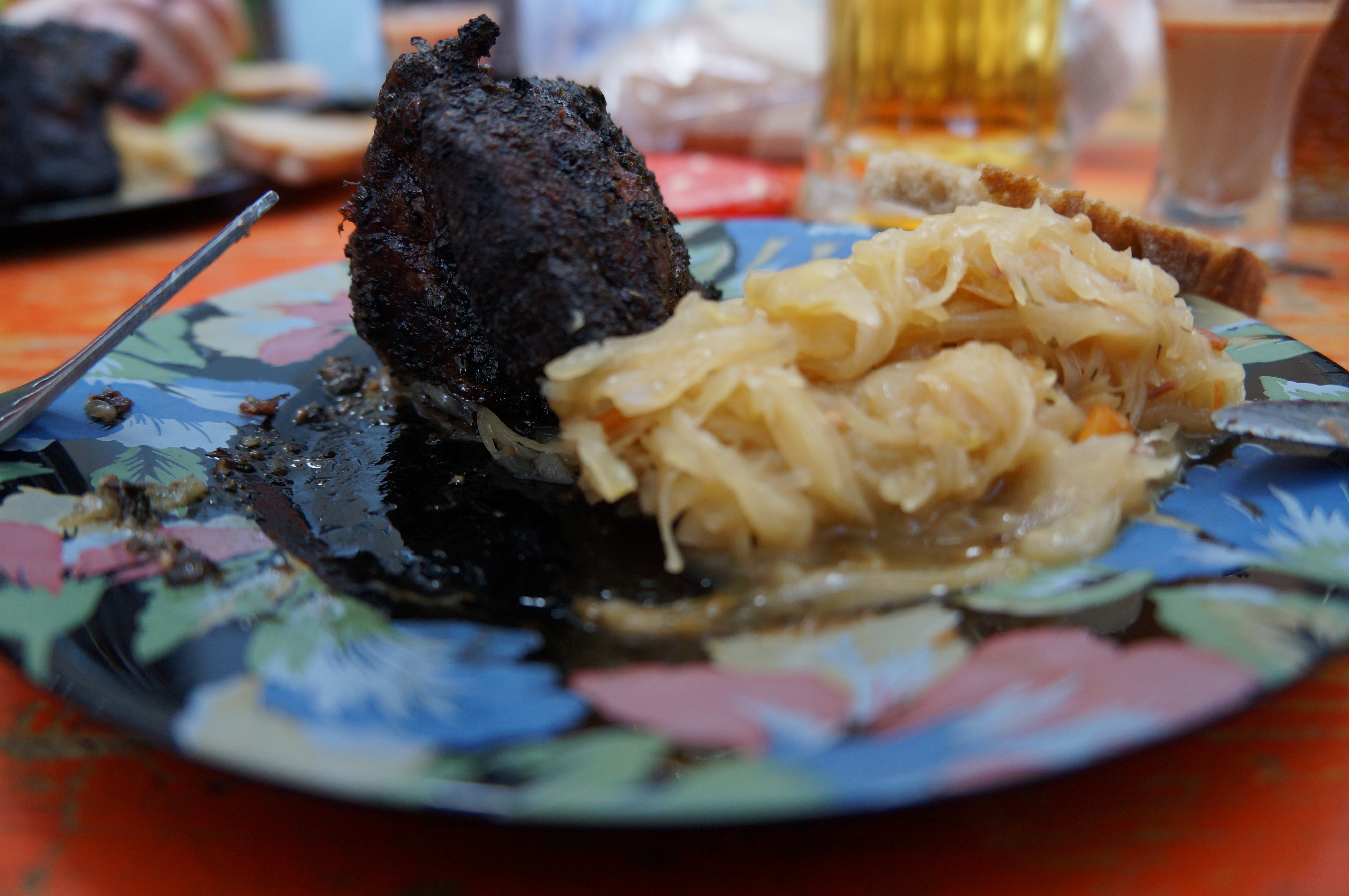 Mutzbraten serviert zu Sauerkraut und Brot. (Allerdings der Versuchung nicht widerstanden und schon probiert.)